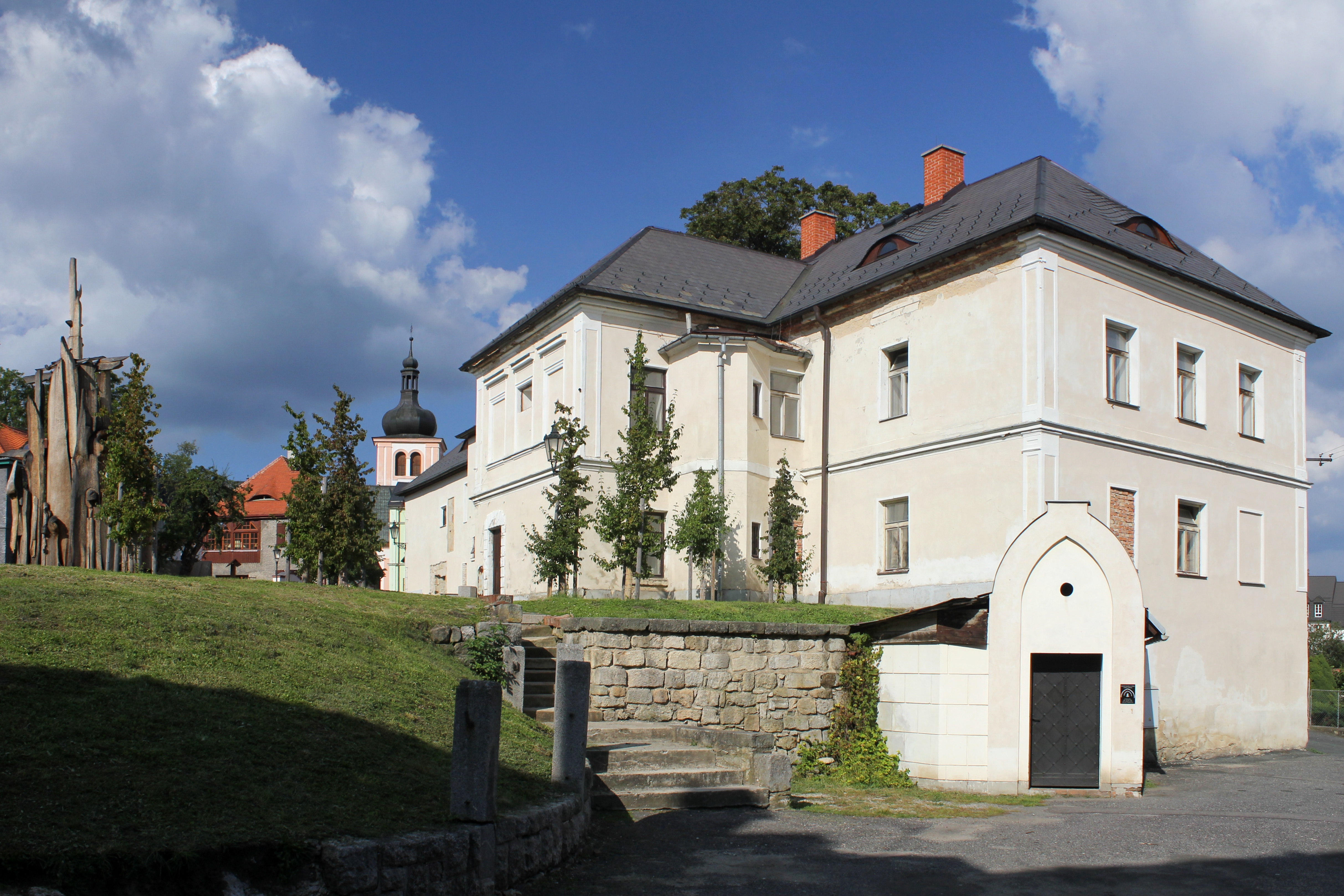 Nádvoří johanitské komendy (Rajský dvůr), Český Dub